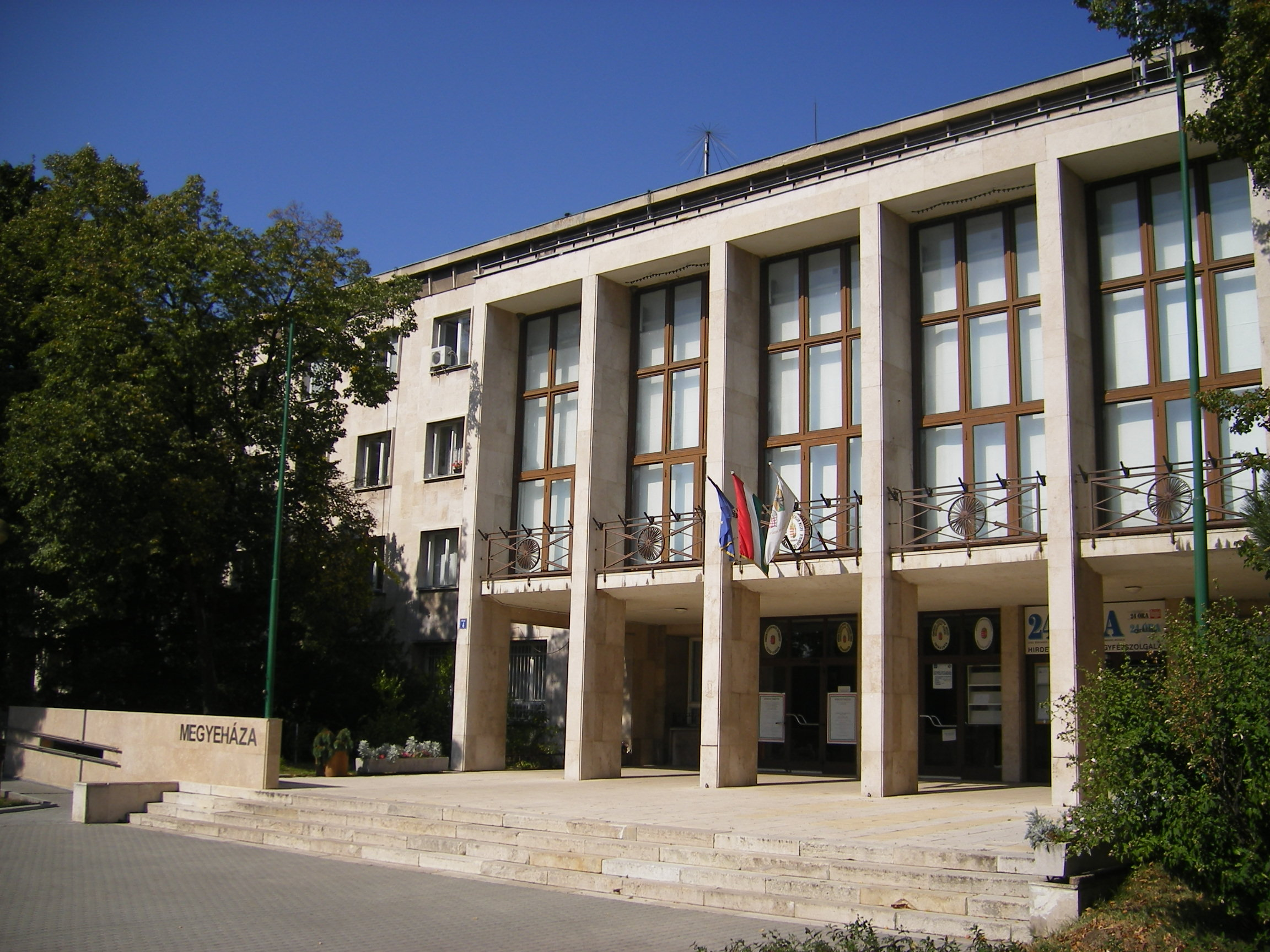 Megyei hivatal épülete(Komárom-Esztergom county municipal building), Tatabánya